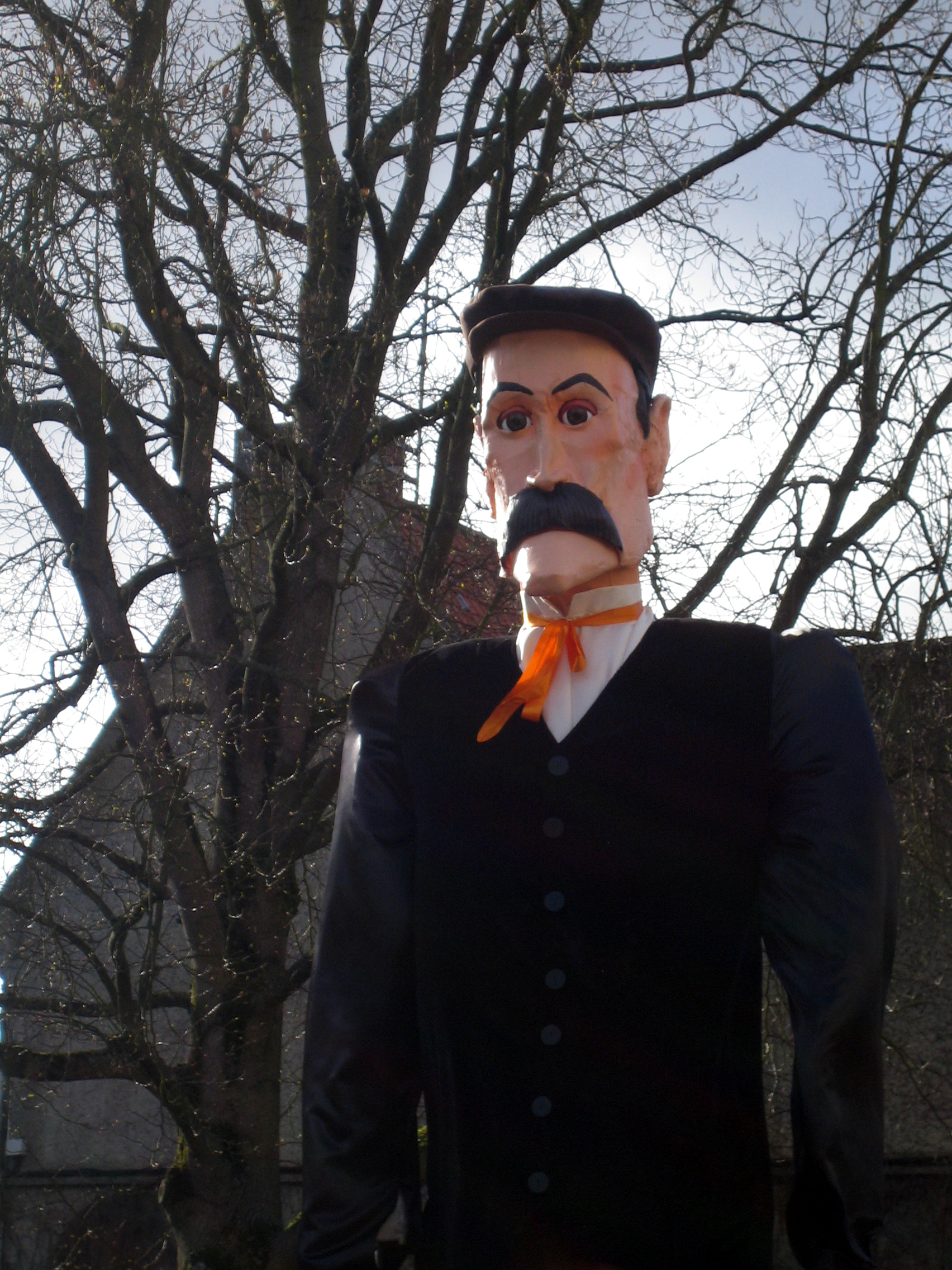 Doullens (Somme), France - Première sortie officielle du géant local "Florimond Long Menton".Le visage est typique (conforme à la tradition) et reconnaissable, même s'il s'agit là d'une toute nouvelle marionnette, les 2 précédentes versions ayant été successivement détruites.